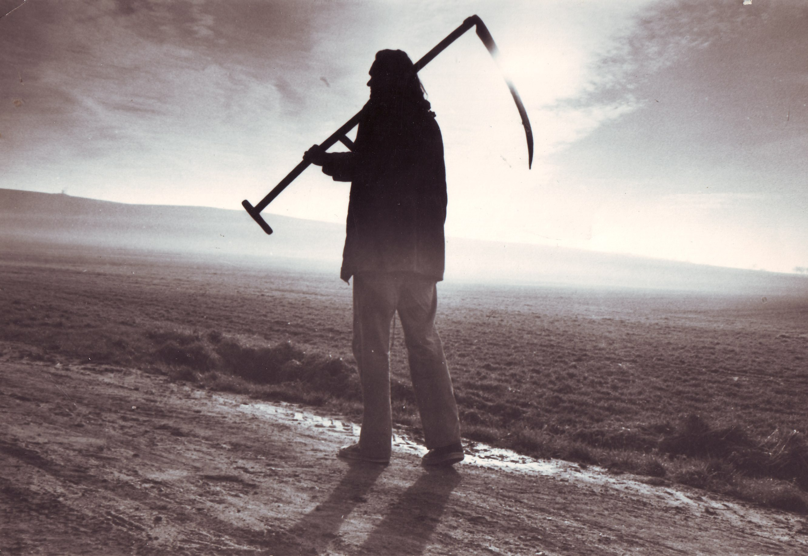 Hubertus Schmidt als Sensenmann, Plakatfoto für das Programm 22 Songs" - Foto Christoph Bigalke